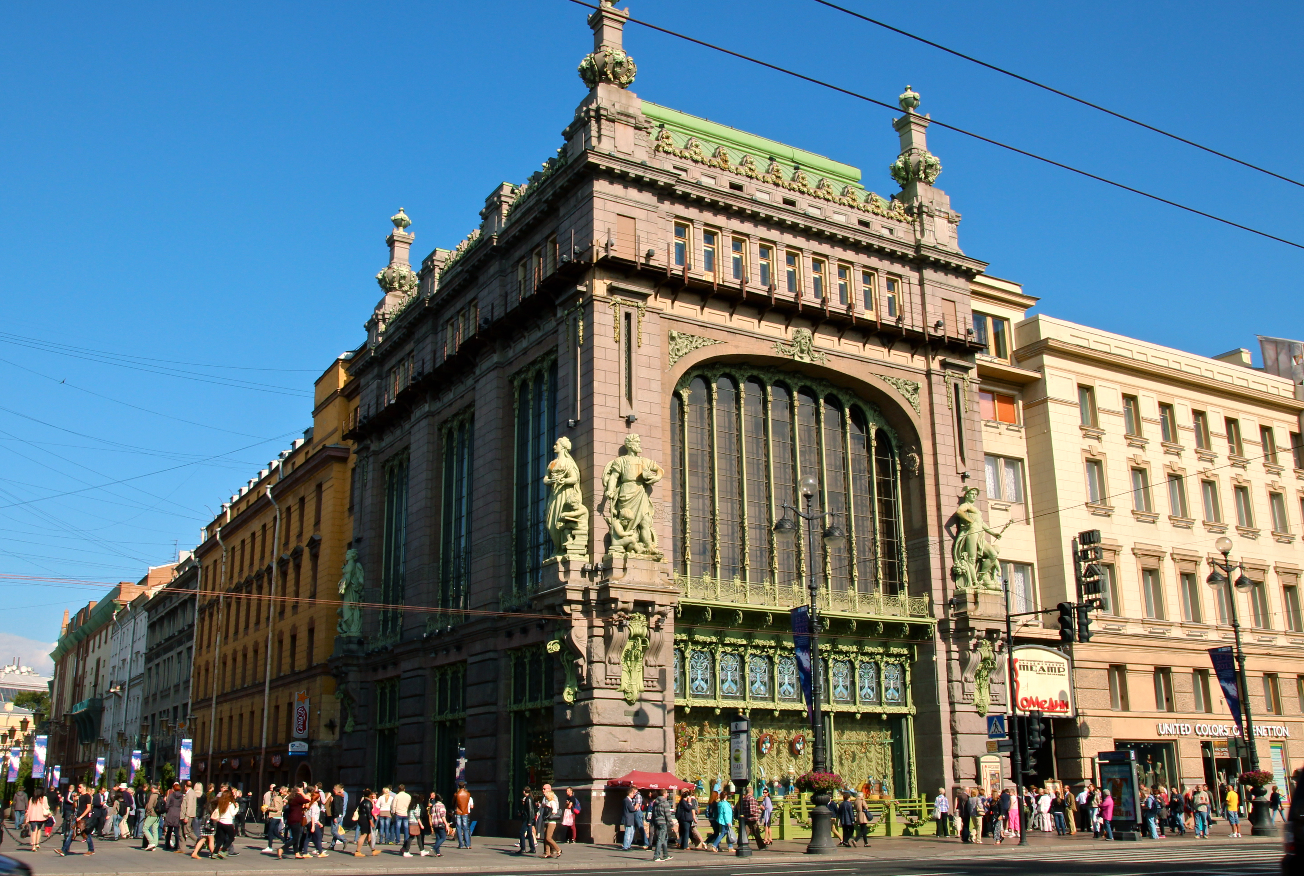 Главный корпус торгового дома «Братья Елисеевы» (Санкт-Петербург и Лен.область, Санкт-Петербург, Невский проспект, 56, лит. А2, Малая Садовая улица, 8)